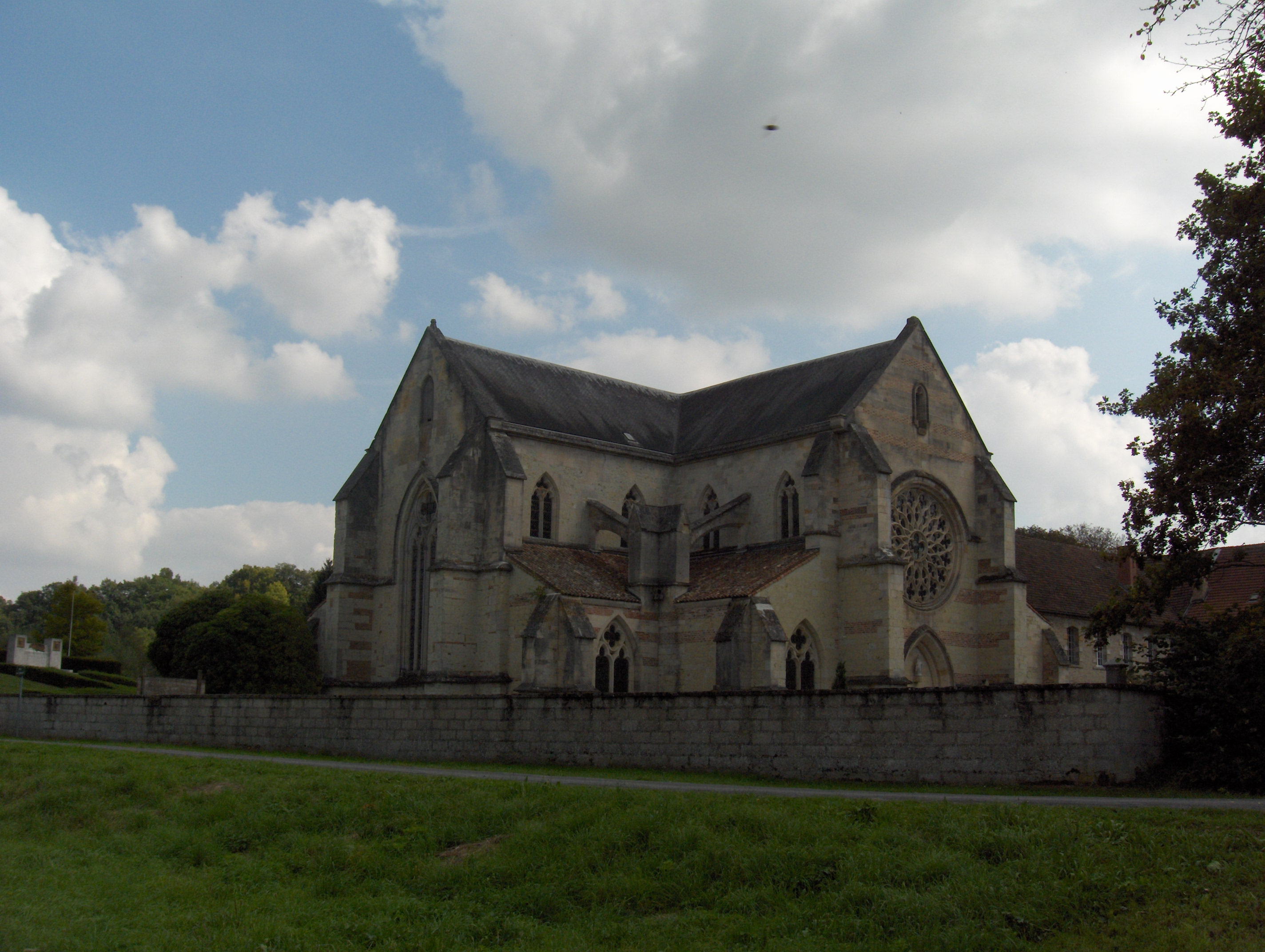 Abbaye cistercienne de la Chalade aux Islettes